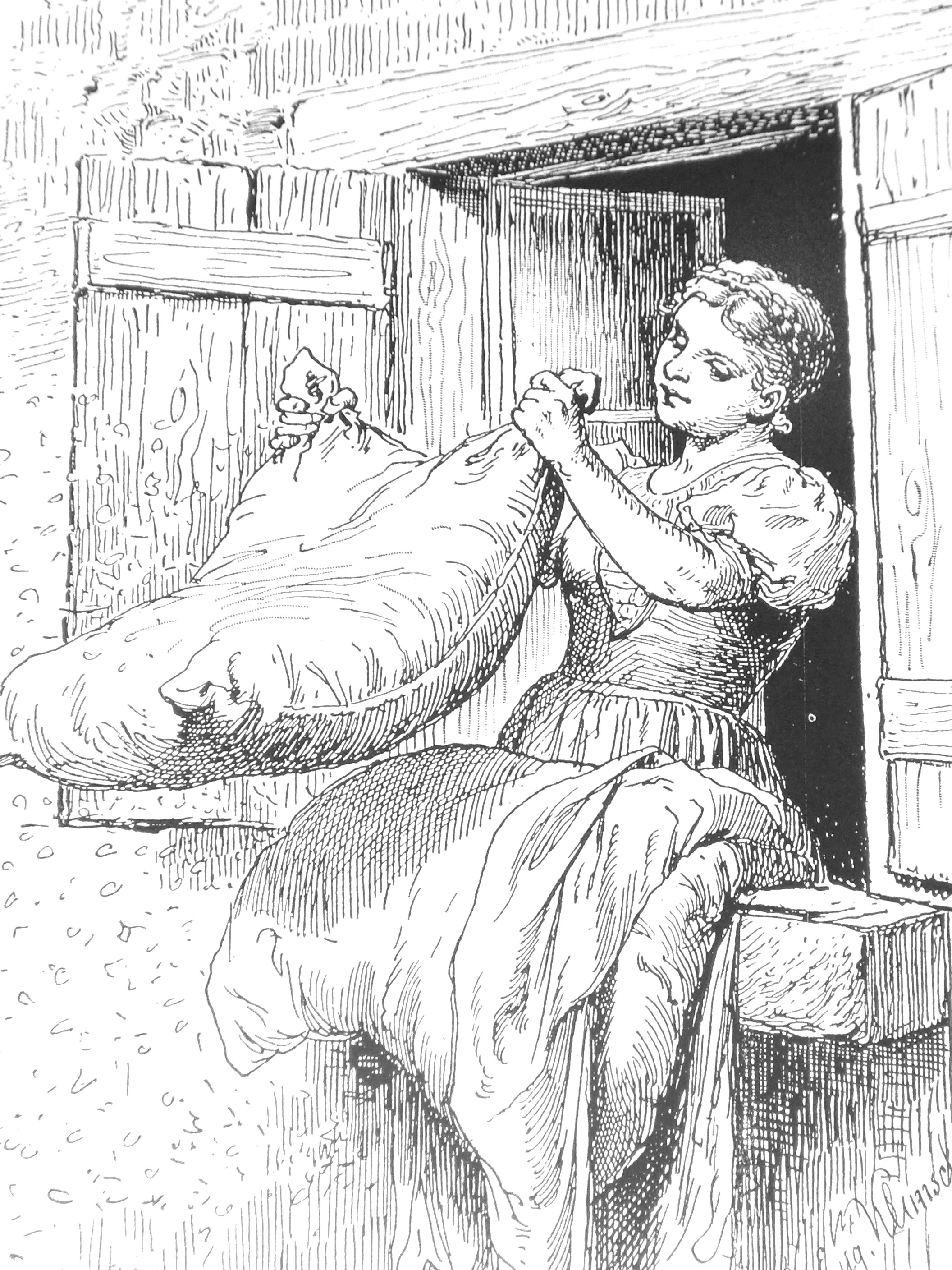 Goldmarie aus dem Märchen "Frau Holle" Illustration von Hermann Vogel (1854-1921)